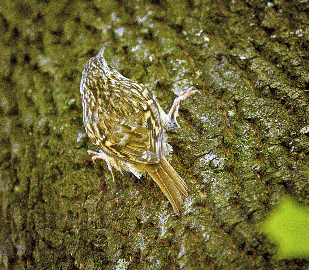 Short-toed treecreeper (Certhia brachydactyla) climbing a tree. Pełzacz ogrodowy (Certhia brachydactyla) wspinający się na drzewo.